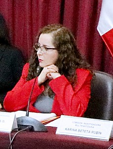 Fiscal de la Nación presentó avances en investigaciones por caso ‘Lava Jato’